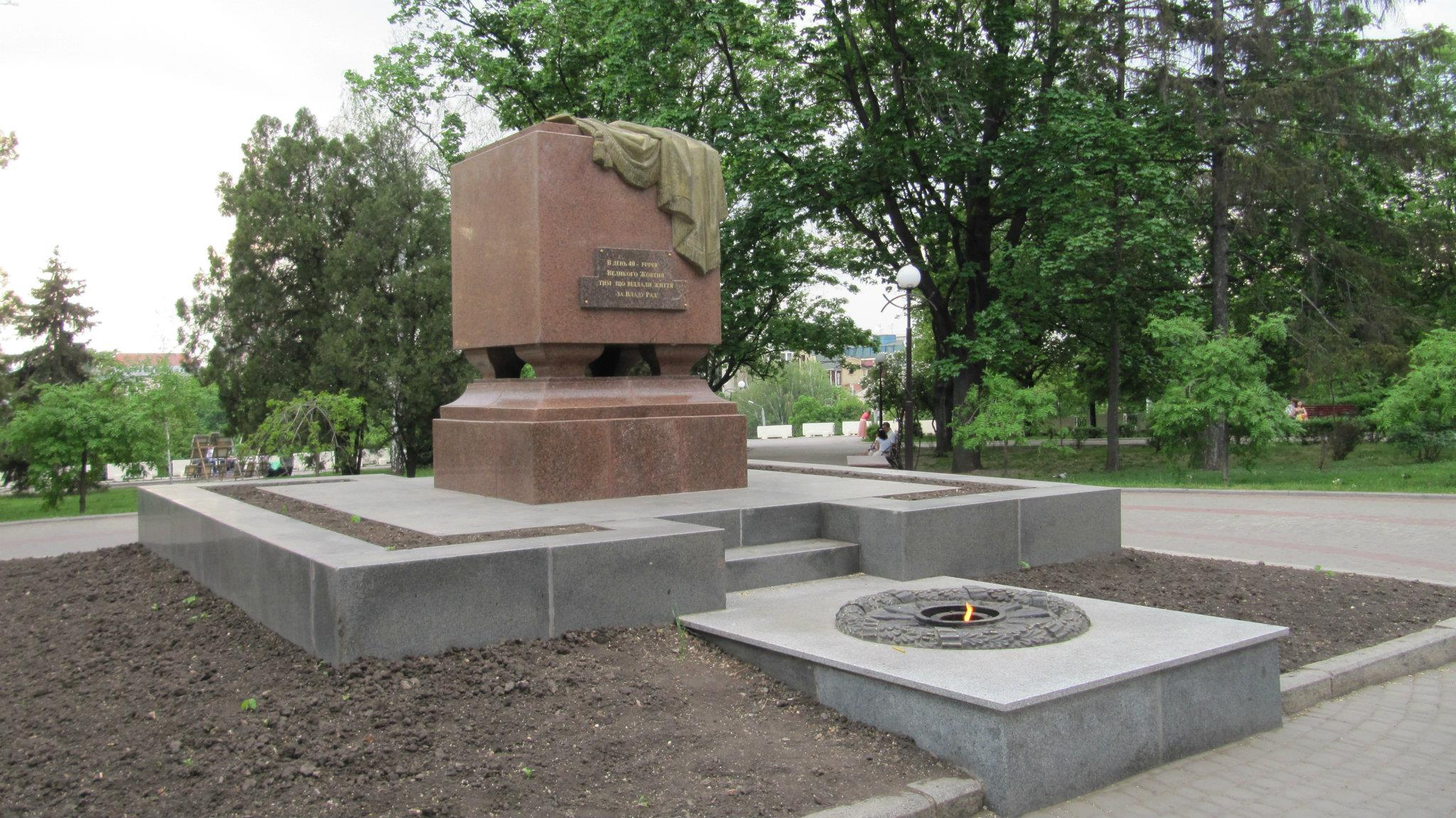 Університетська пл.